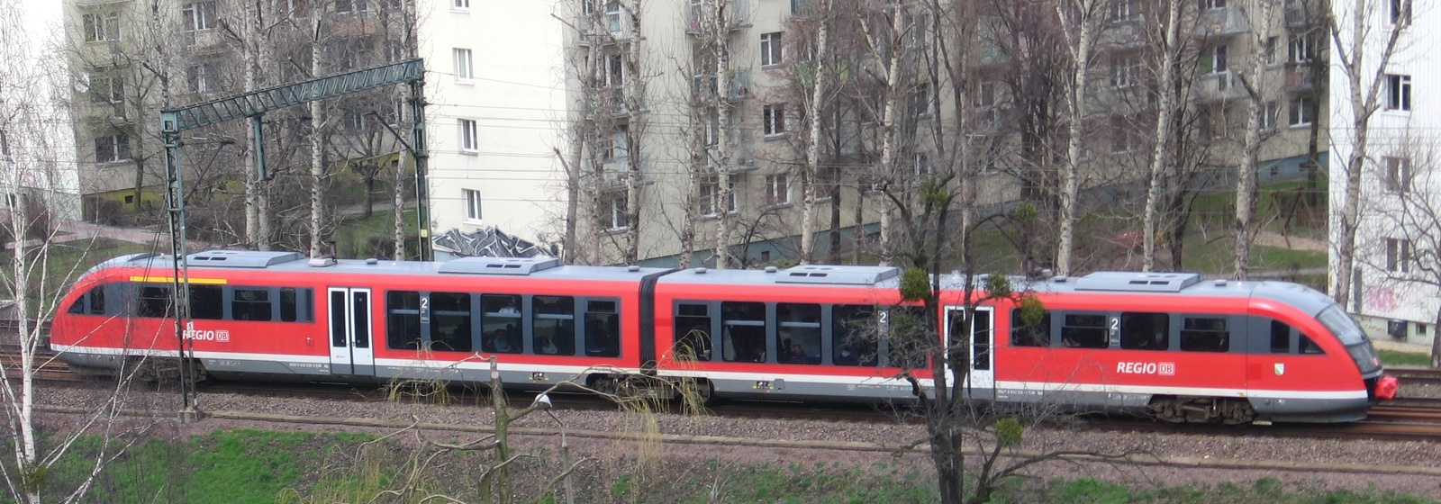 Vlak Regio společnosti Deutsche Bahn ve Wrocławi, Polsko